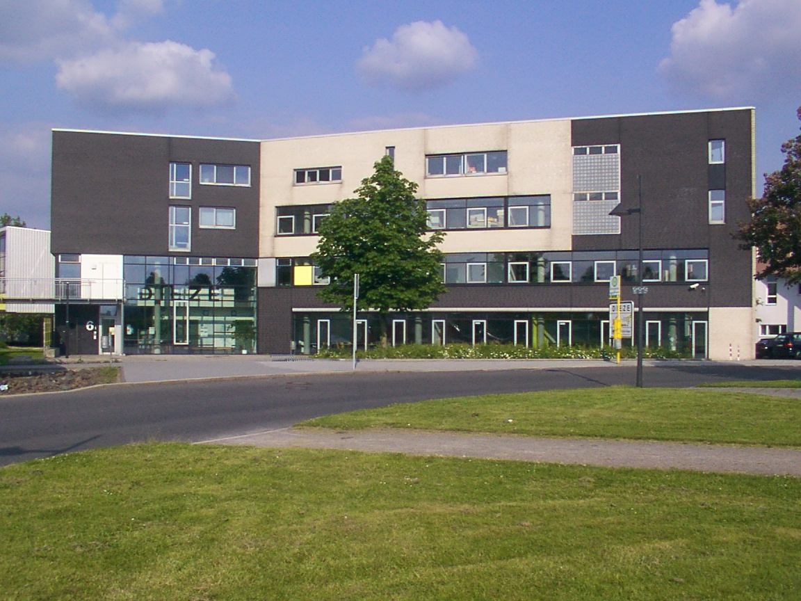 Castrop-Rauxel: Dienstleistungszentrum Zeche Erin